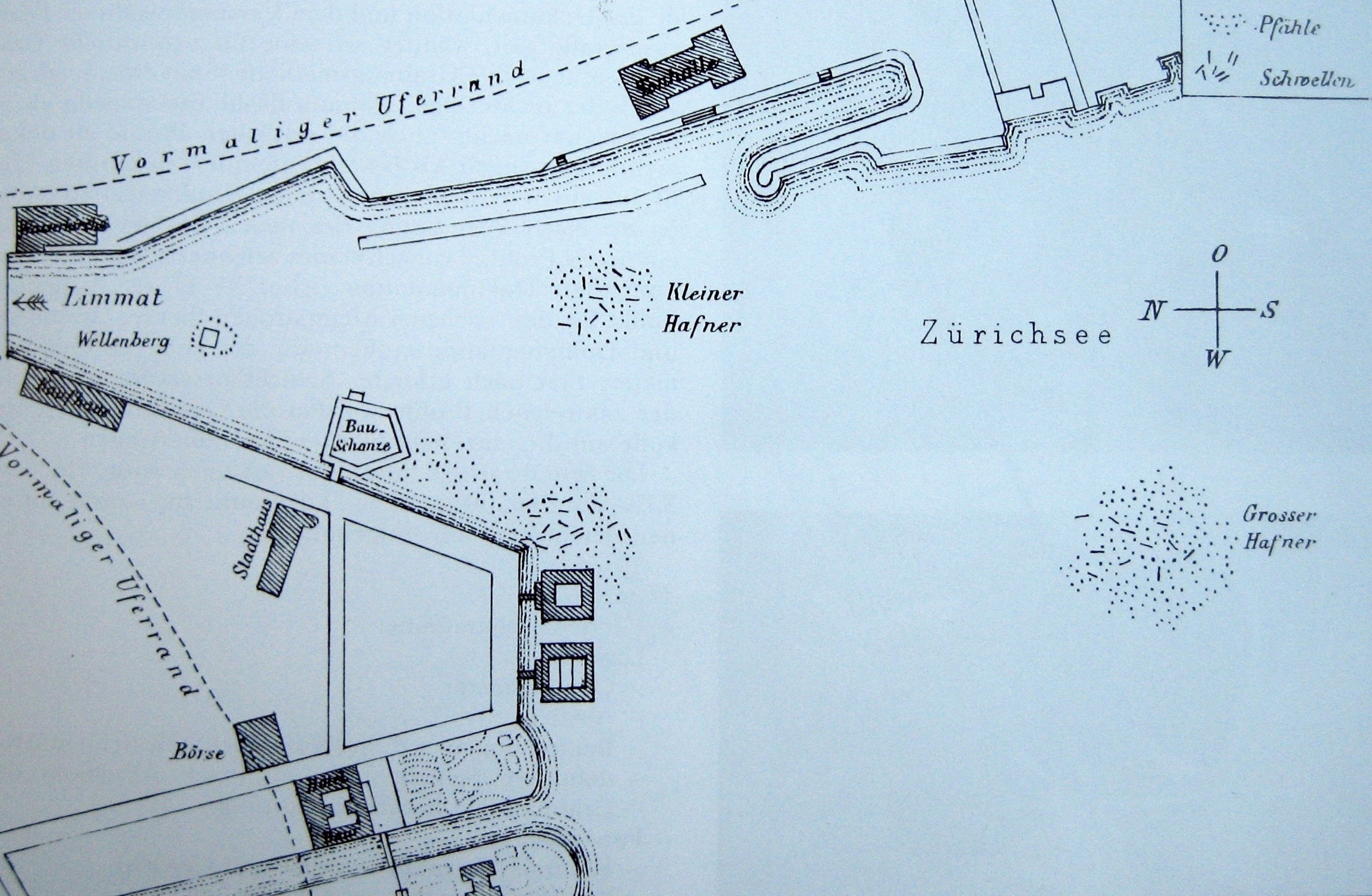 Zürich : Lage des Grossen (Bildmitte) und Kleinen Hafner im unteren Zürichseebecken. Im oberen Limmatraum sind der Wellenberg (links) und das Ravelin Ravelin (Bauschänzli) (mit dem angrenzenden Alpenquai beim Bürkliplatz) sowie unten links der Schanzengraben der barocken Stadtbefestigung eingezeichnet. Im ehemaligen Kratzquartier zu erkennen sind ganz links das Kornhaus (darüber die Wasserkirche), das alte Stadthaus und die Alte Börse (unten links) beim Schanzengraben. Die ebenfalls im Plan (rechts oben) eingezeichnete "Alte Tonhalle" markiert in etwa den Standort des Opernhauses östlich des Bellevue-Platzes. Bei der direkt darunter ersichtlichen künstlichen Einbuchtung könnte es sich um den ehemaligen "Kriegshafen" der Stadt Zürich handeln. Zeichnung von Ferdinand Keller (1800 - 1881).